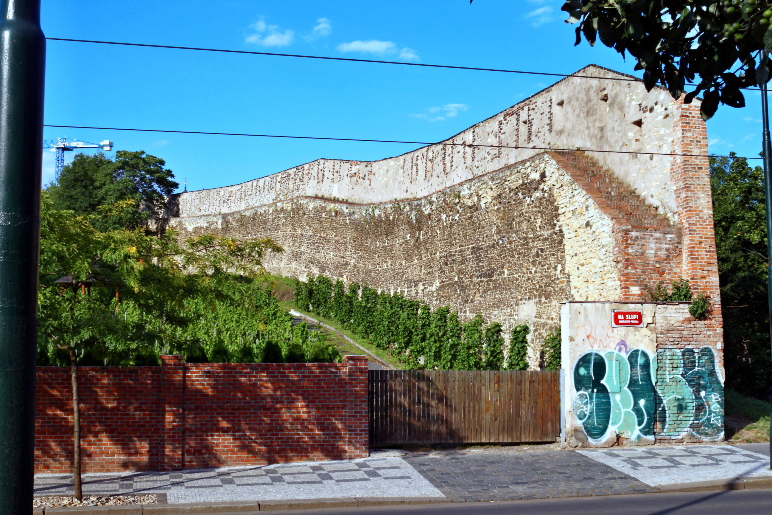 Ulice Na slupi